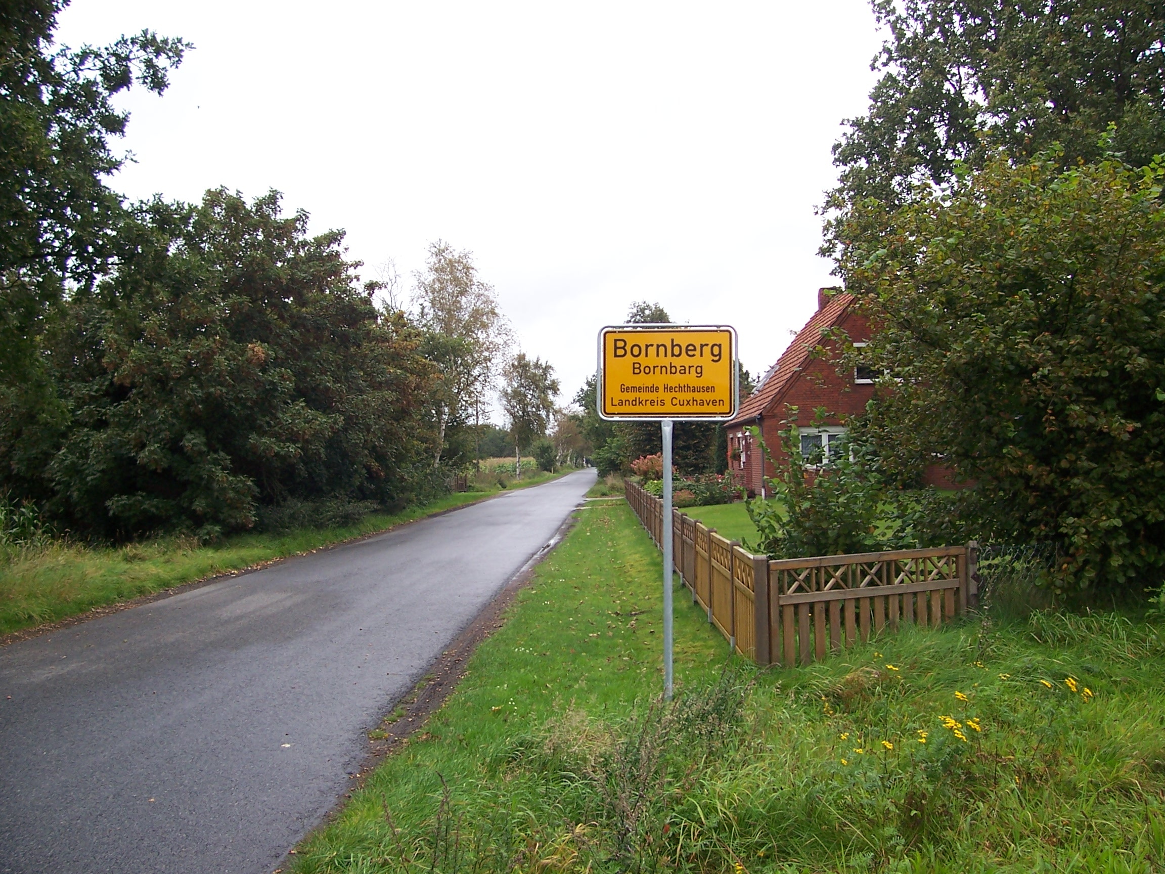 Oortsingang Bornbarg, Laumöhlener Straat mit tweesprakig Oortsschild Hoochdüütsch/Plattdüütsch